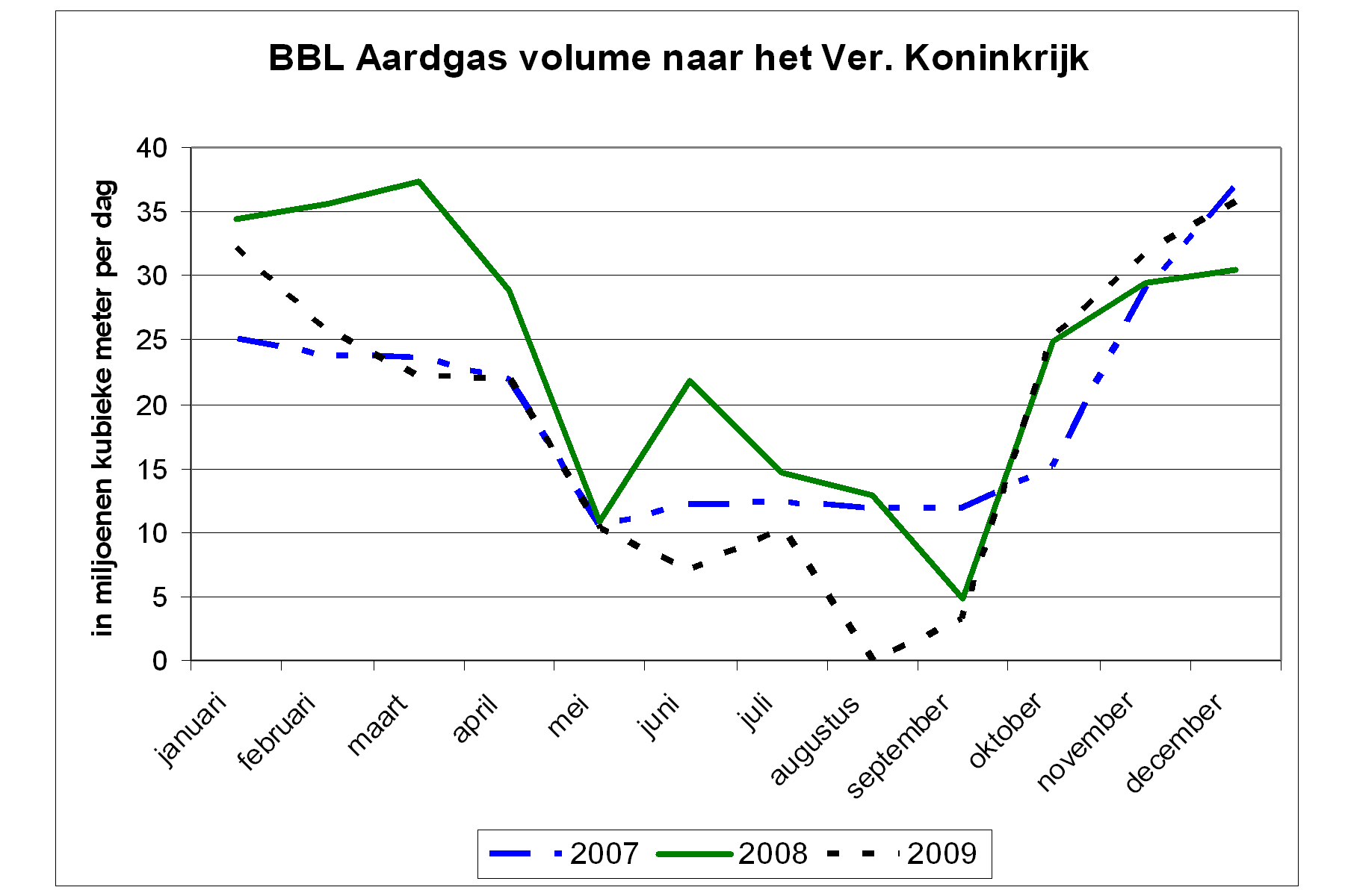 Gas volume door de BBL-pijplijn naar het Verenigd Koninkrijk (gemeten in miljoenen kubieke meters per dag) Bron: National Grid